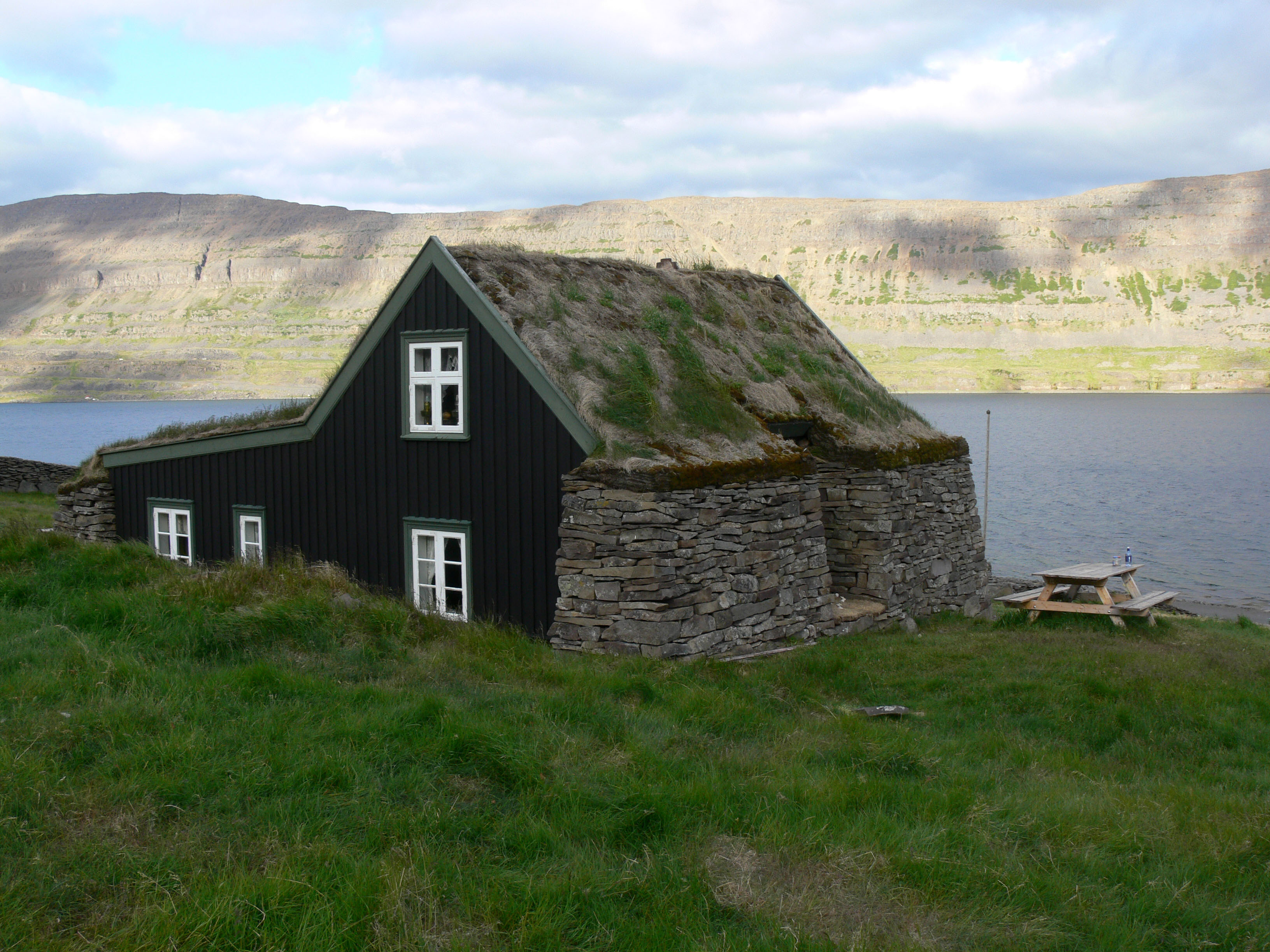 Litlibær am Ísafjarðardjúp wurde 1895 erbaut. Die Bewohner lebten vom fischfang. Zeitweise lebten bis zu 20 Personen hier. Das Anwesen war bis 1969 bewohnt. Jetzt wird es als Café für Touristen genutzt.